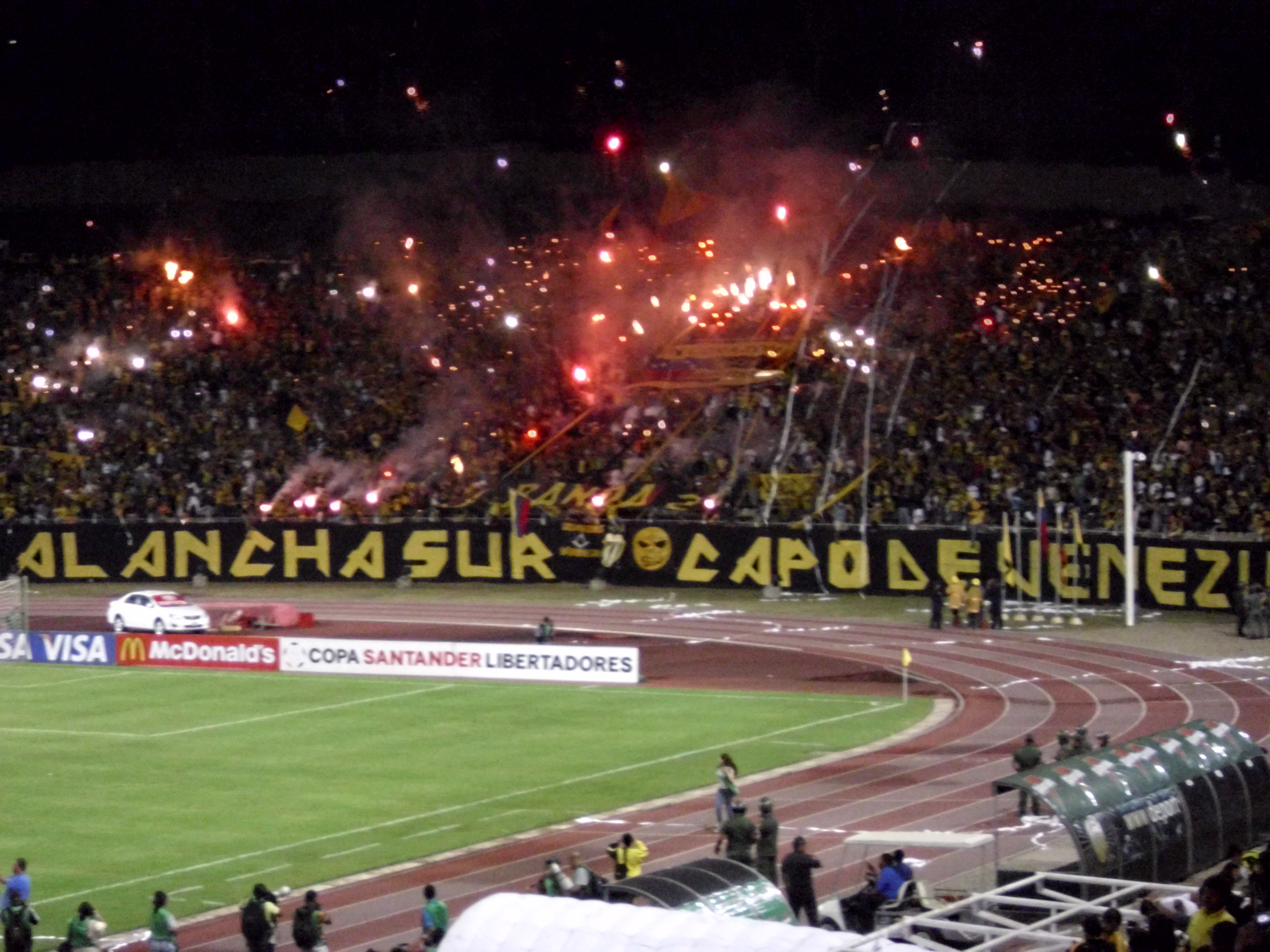 La Avalancha Sur en el partido entre el Deportivo Táchira y Santos por la Copa Libertadores 2011.